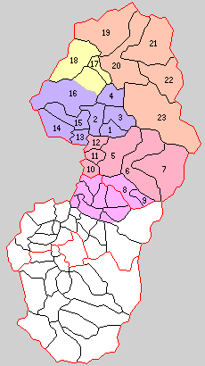 山形県北村山郡の町村。